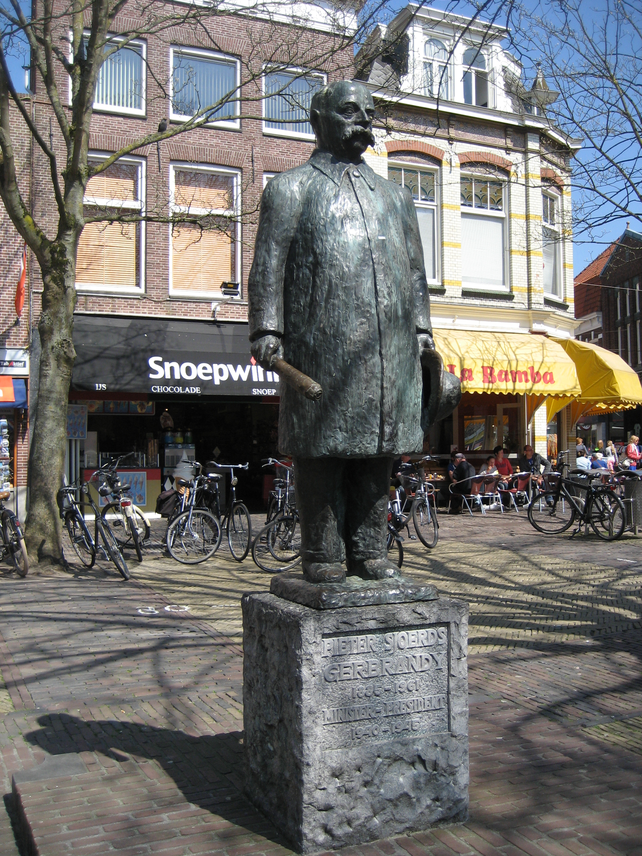 Standbeeld P.S. Gerbrandy door Maria van Everdingen, Schaapmarktplein, Sneek, Friesland, Nederland. Tekst op de sokkel: Pieter Sjoerds Gerbrandy 1885-1961 Minister-president 1940-1945